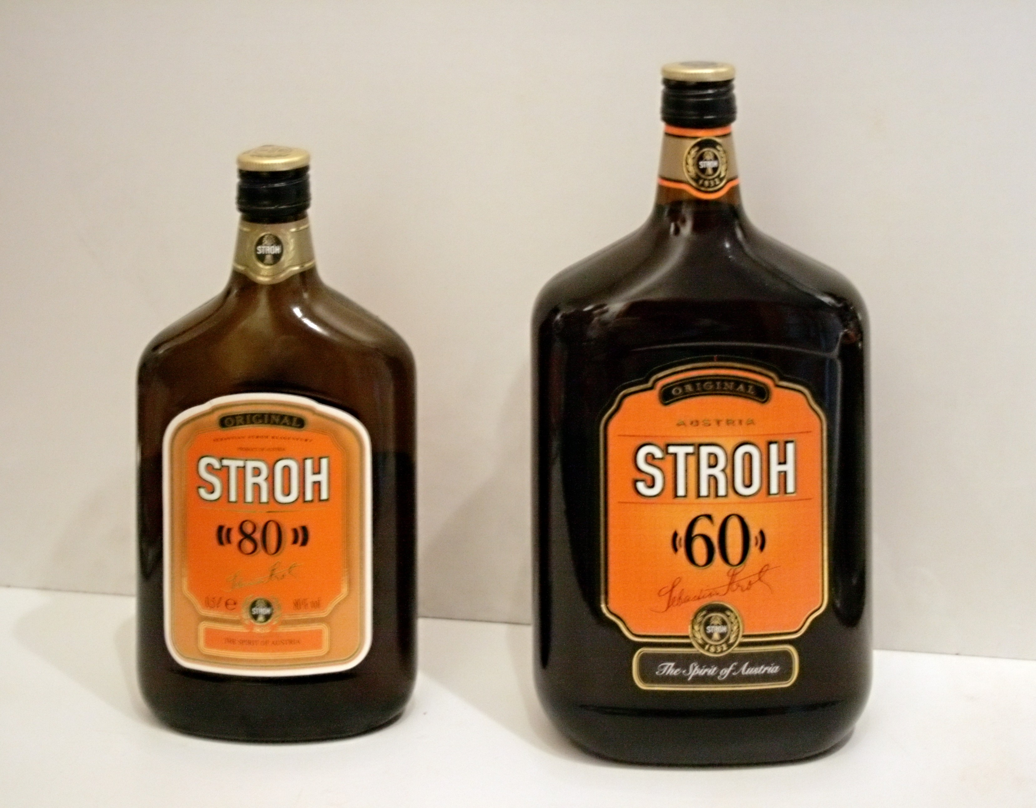 rum (Stroh)